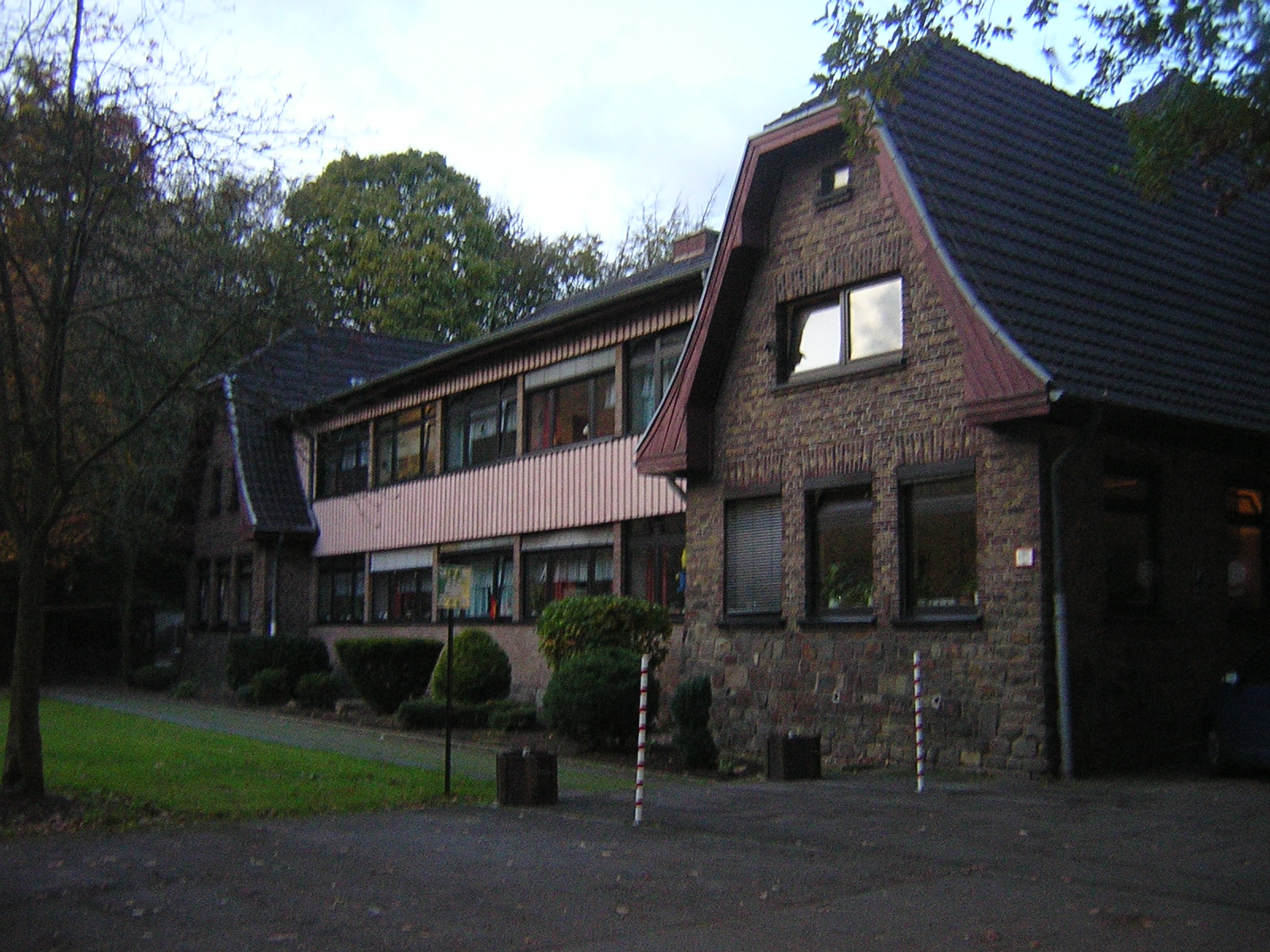 Haus Welchenberg in Neuenhausen, Grevenbroich